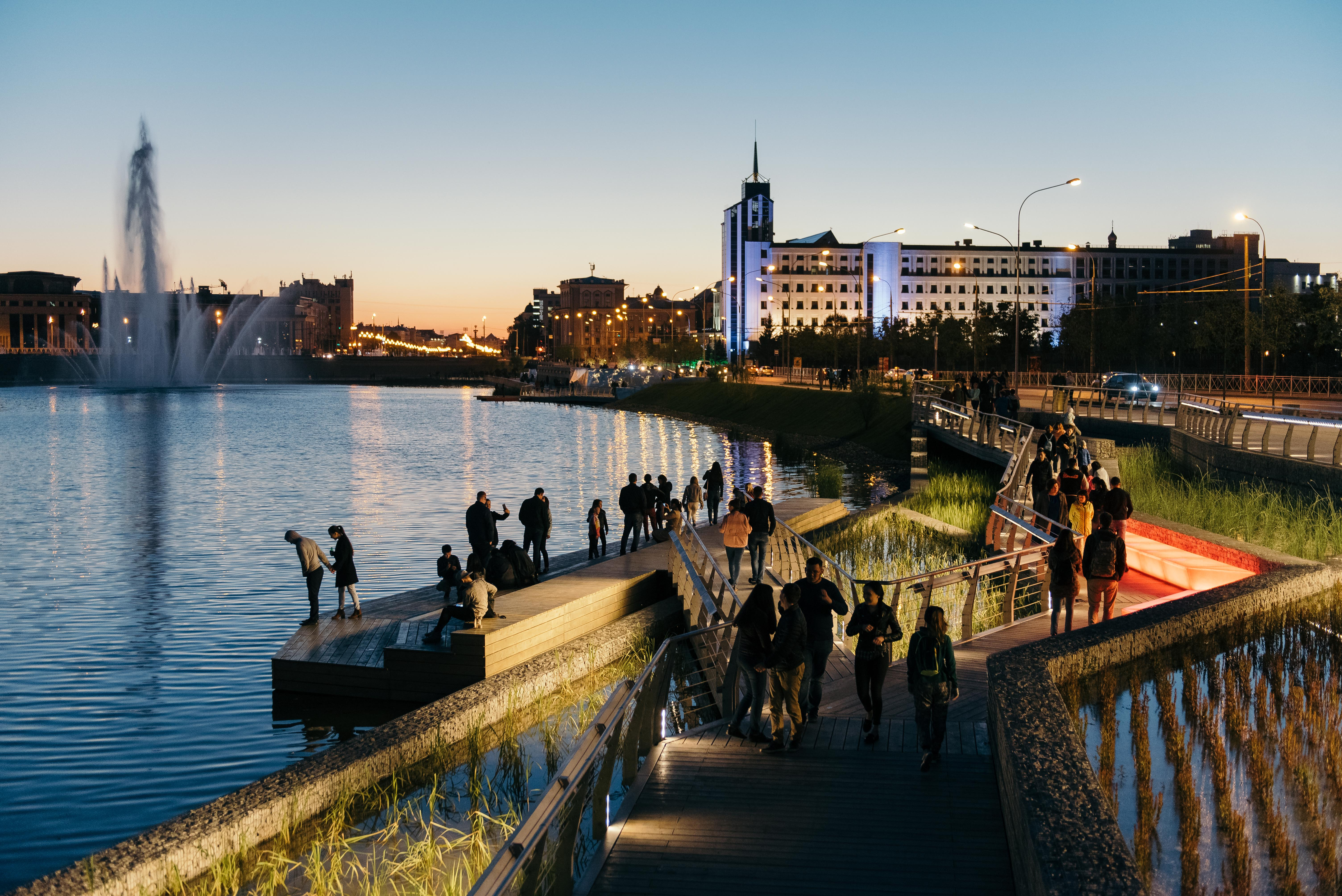 Вид на благоустроенную набережную со стороны улицы Салимжанова